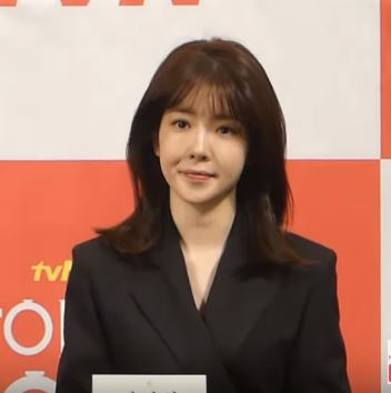 13일 오후 서울시 강남구 논현동 임피리얼 팰리스 서울에서 tvN 새 수목드라마 '싸이코패스 다이어리’ 제작발표회가 열려 배우 윤시윤, 정인선, 박성훈이 참석해 작품소개 와 배역 소개를 하고 있다.